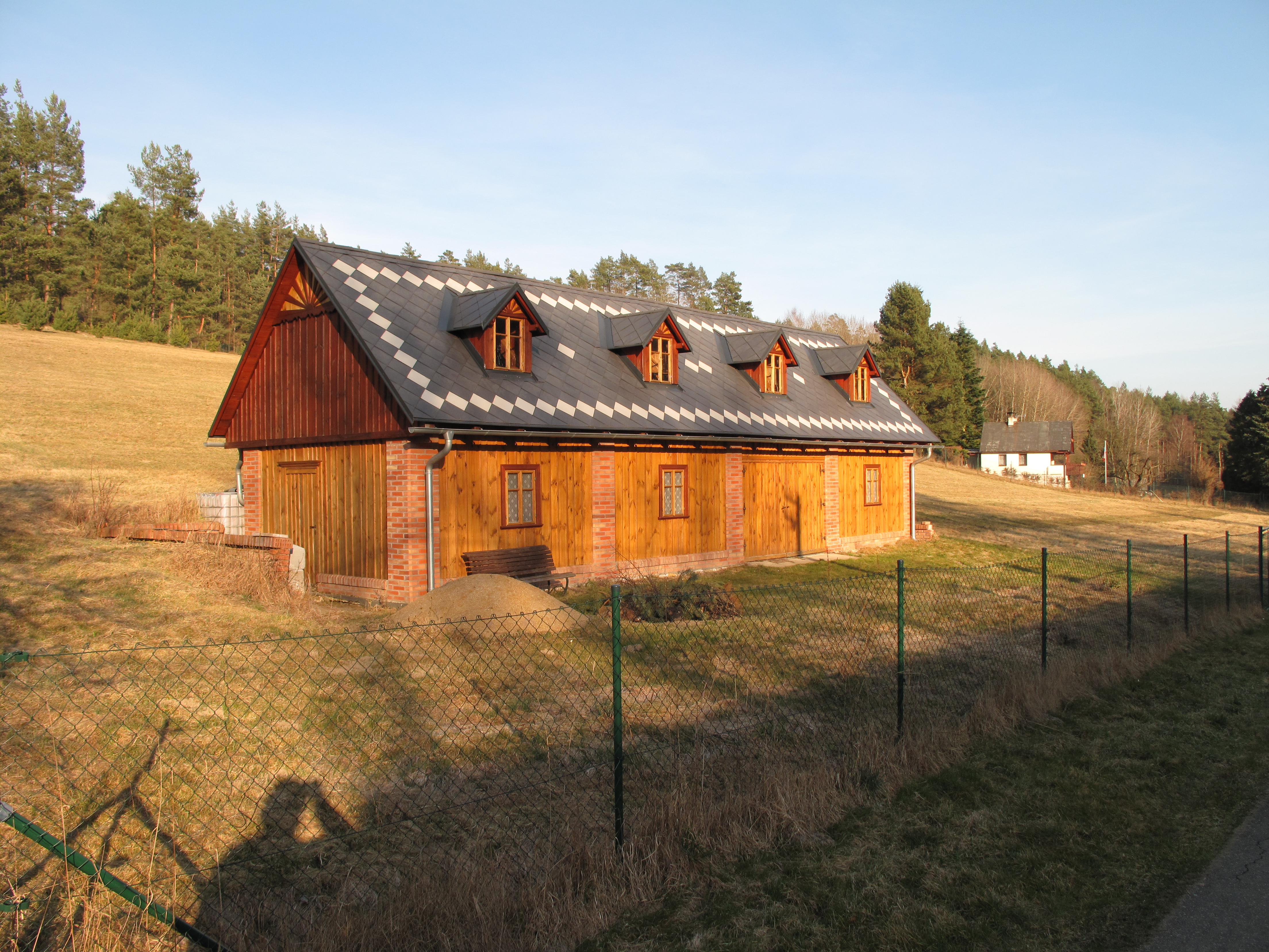 Dřevostavba v Lískách. Okres Liberec, Česká republika.